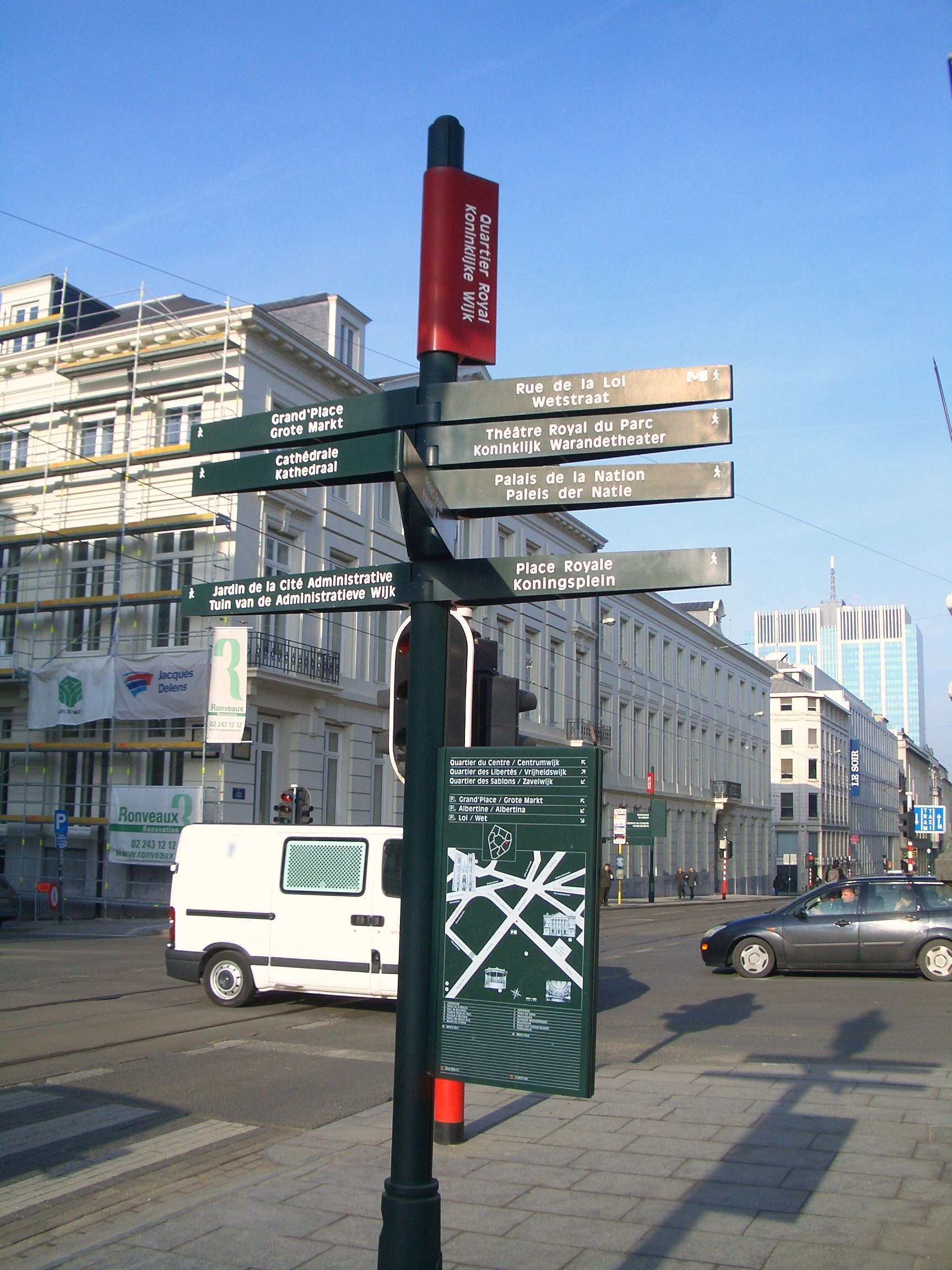 Jellegzetes kétnyelvű (francia és holland) turisztikai tájékoztató tábla Brüsszel belvárosában (Rue de la Loi X Rue Royale, metro Parc)